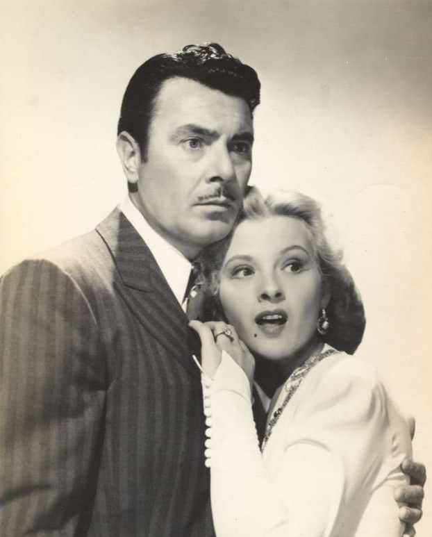 Ilona Massey és George Brent az "International Lady" filmben.